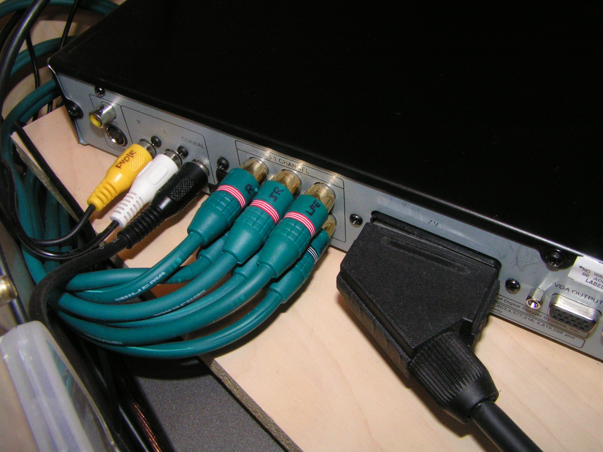 DVD-soittimen takapaneeli